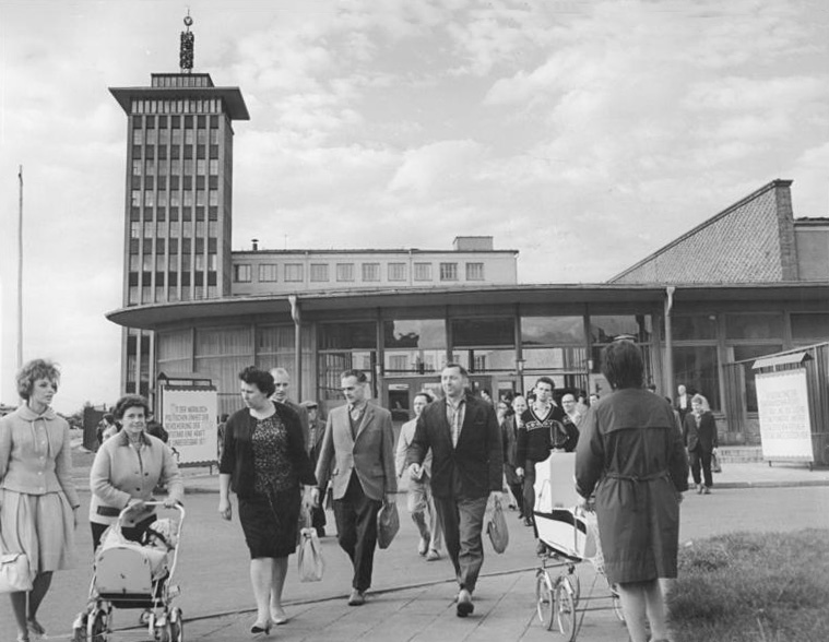 Plauen, Werkzeugmaschinenbetrieb, Außenansicht Zentralbild Gahlbeck 26.9.1964 VEB Werkzeugmaschinenfabrik Plauen 1949 wurde der als "Wiege der Automatisierung" bekannte volkseigene Werkzeugmaschinenbetrieb "Wema" in Plauen (unser Foto zeigt einen Blick auf das Werk) gegründet. Damals begann der Betrieb mit 25 Belegschaftsangehörigen zu arbeiten. Heute stellen fast 1 800 Werkzeugmaschinenbauer hochwertige Sondermaschinen und Taktstraßen her, die sich auch im Ausland großer Beliebtheit erfreuen.